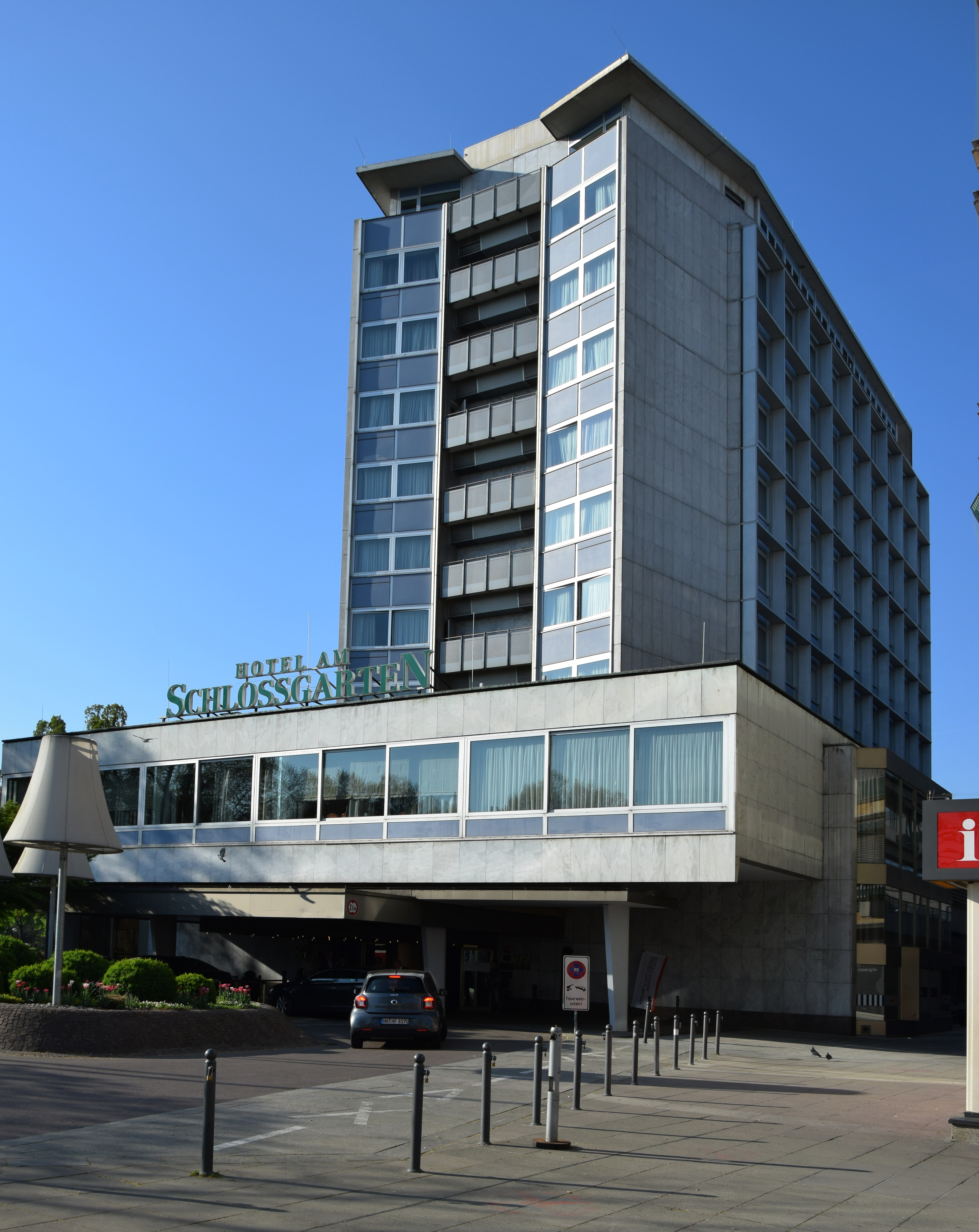 Das Althoff Hotel am Schlossgarten in Stuttgart, erbaut 1962 vom Architekten Hans Paul Schmohl. See also Wikipedia article: de :Hotel am Schlossgarten. Wikidata has entry Q47535867 with data related to this item.